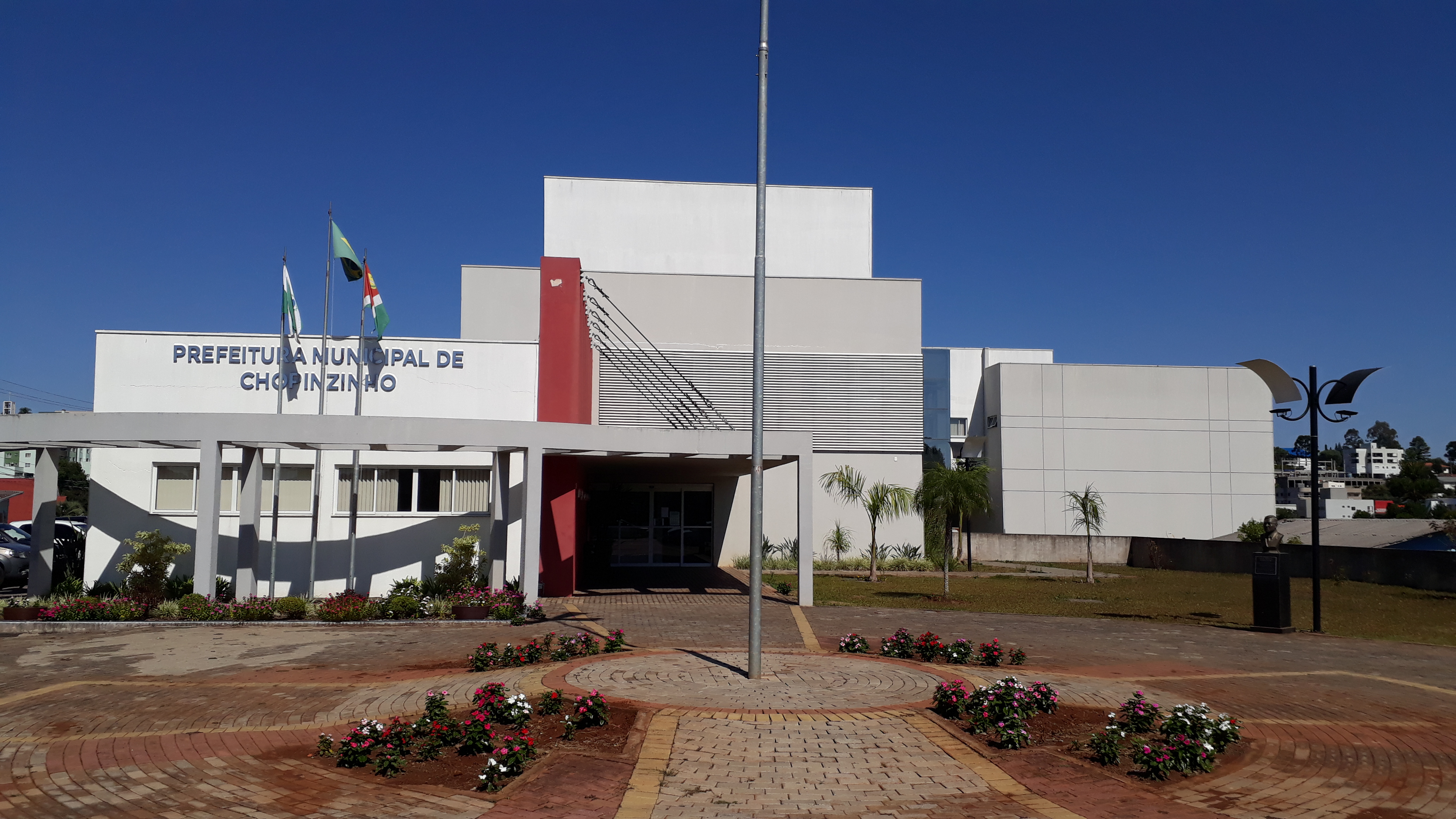 Prefeitura do município brasileiro de chopinzinho